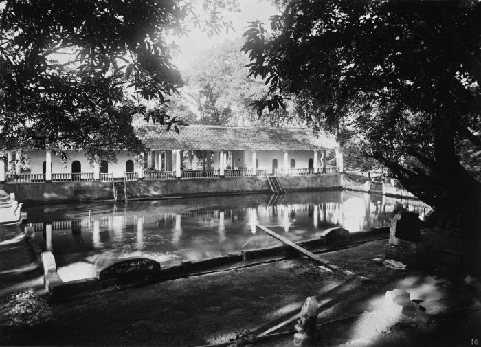 Foto. Badplaats Banjoe Biroe (Blauw Water), Pasoeroean